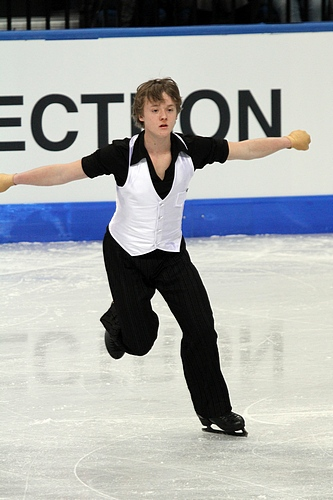 Мартин Раппе (Германия) на чемпионате мира по фигурному катанию среди юниоров 2012